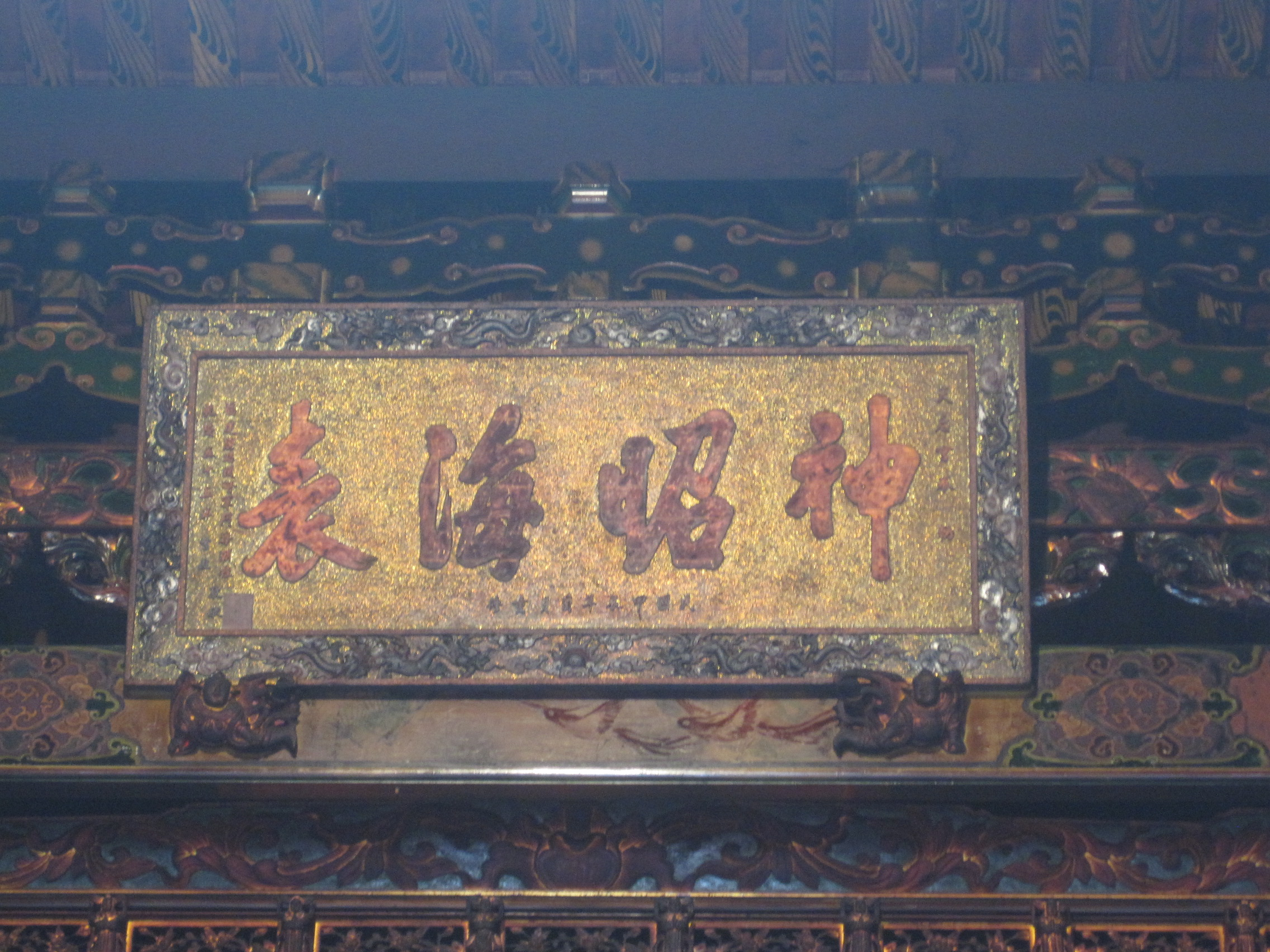 茅港尾天后宮神昭海表匾額，此匾在1964年重修